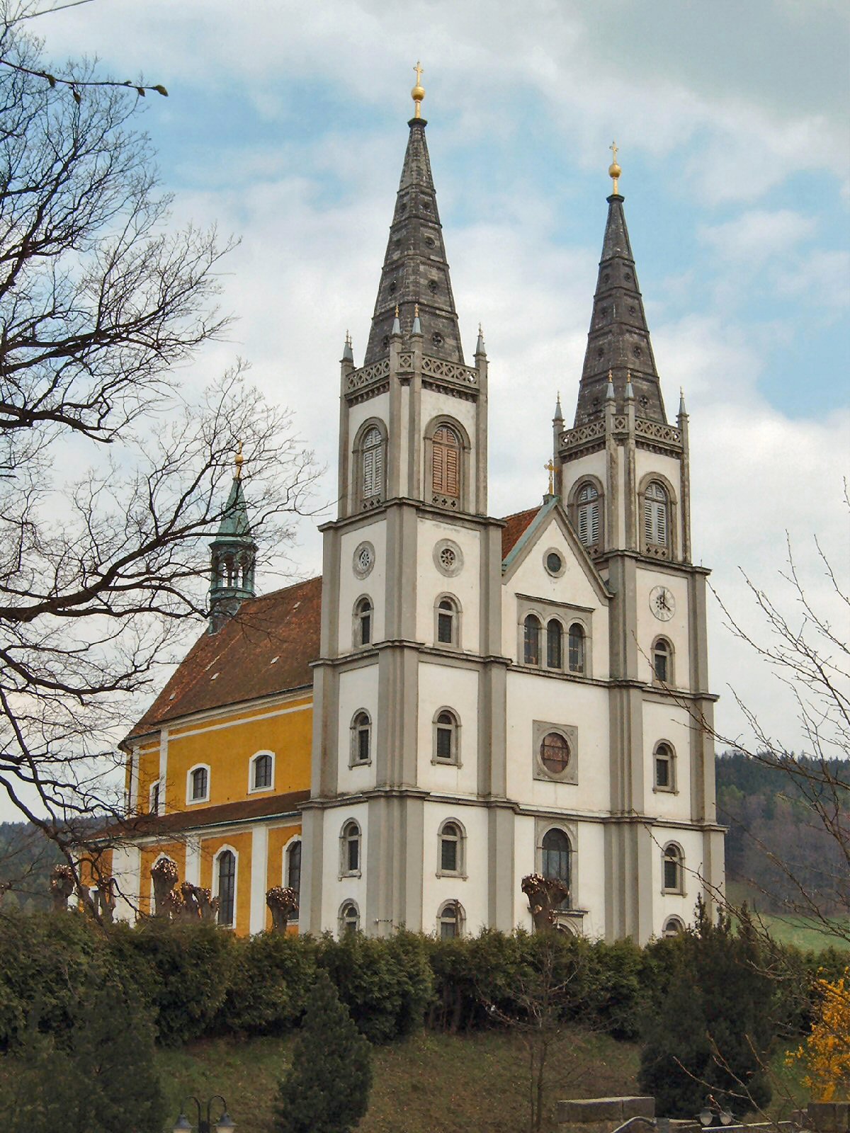 Barockkirche "Mariä Himmelfahrt" in Schirgiswalde